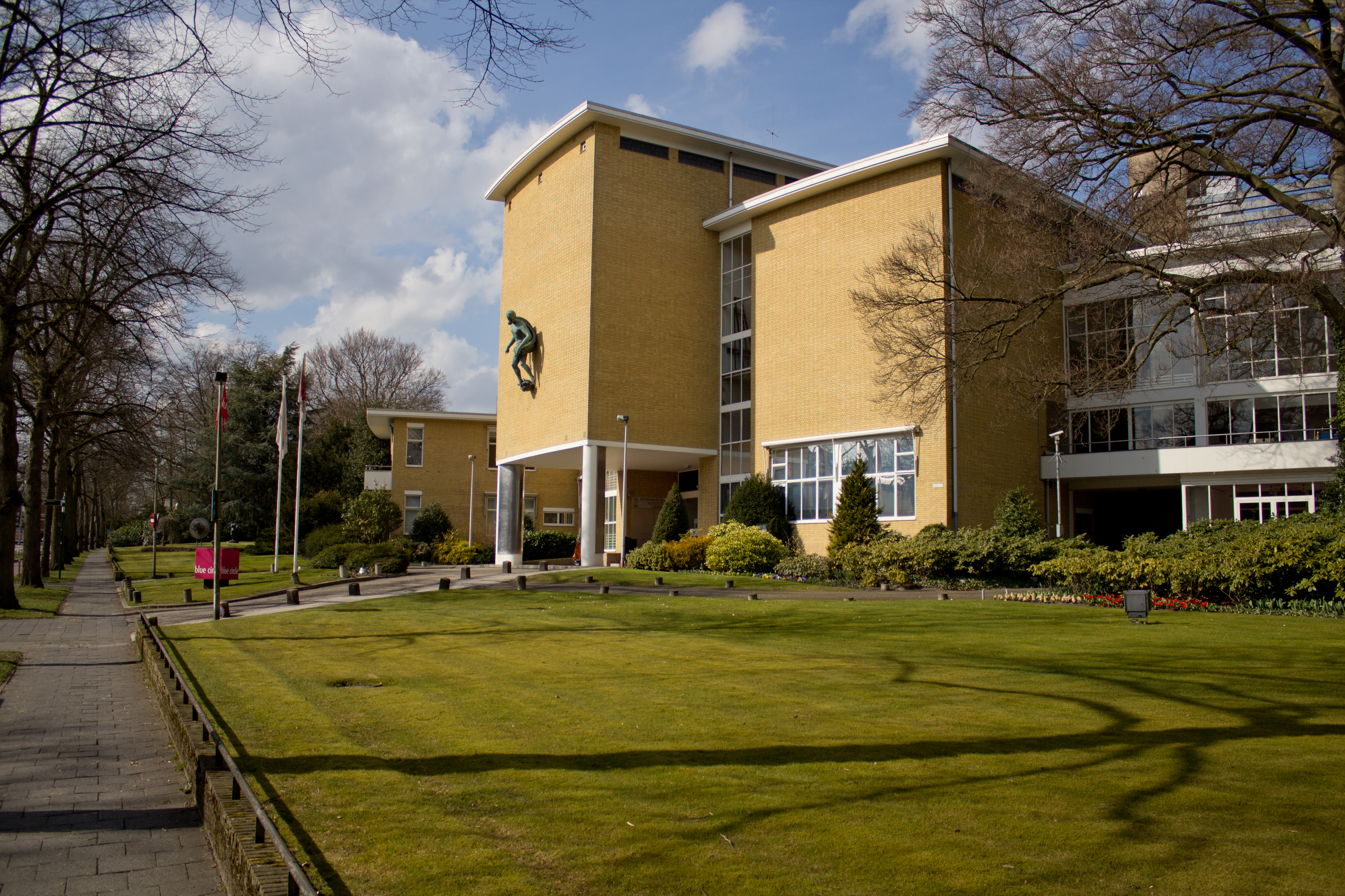 De voormalige AVRO-studio's, 's-Gravelandseweg 52, Hilversum.